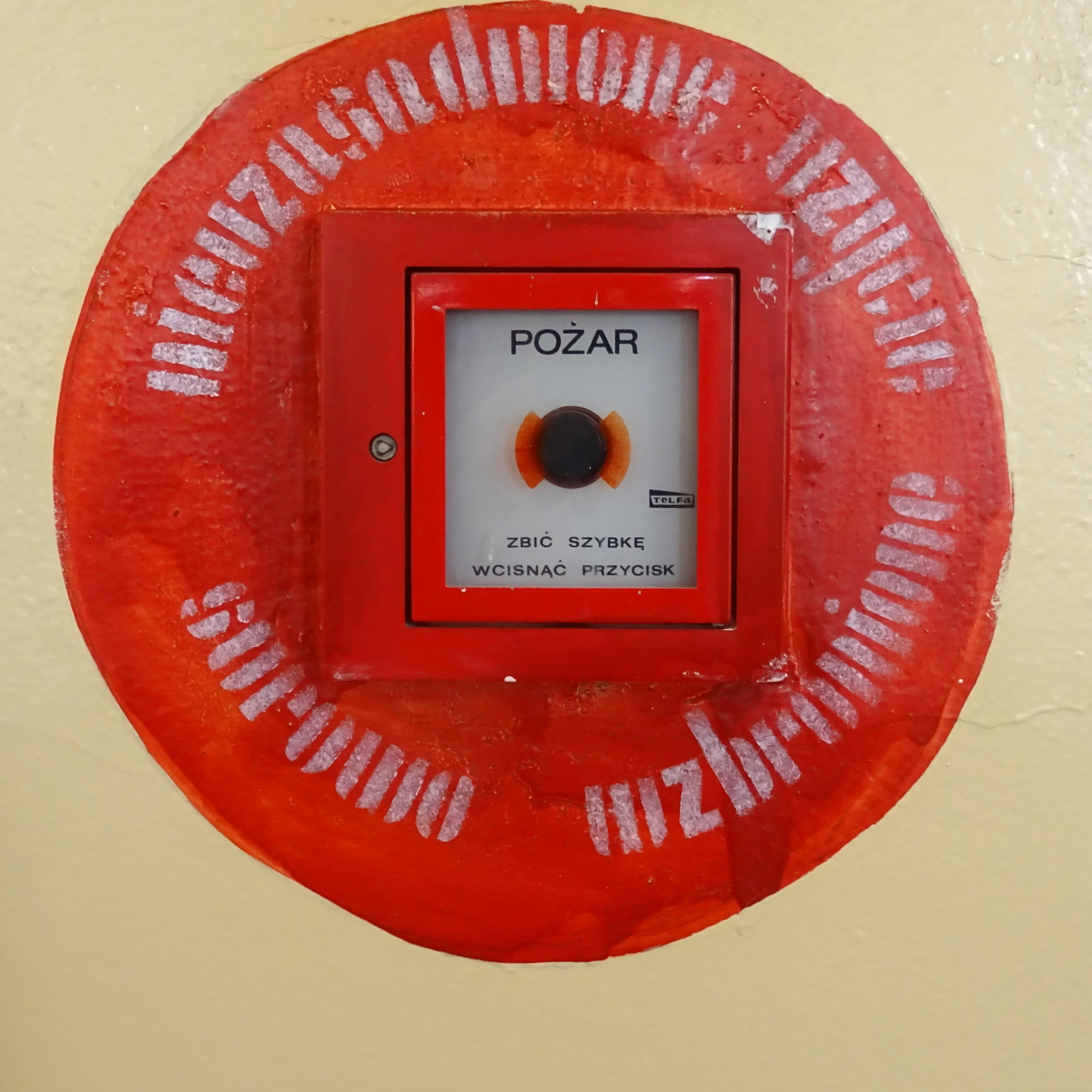 Systemowy przycisk alarmowy "pożar", indywidualnie wzbogacony o informację - "nieuzasadnione użycie surowo wzbronione" (Gorzów Wlkp. Przychodnia przy ul. Walczaka 23)